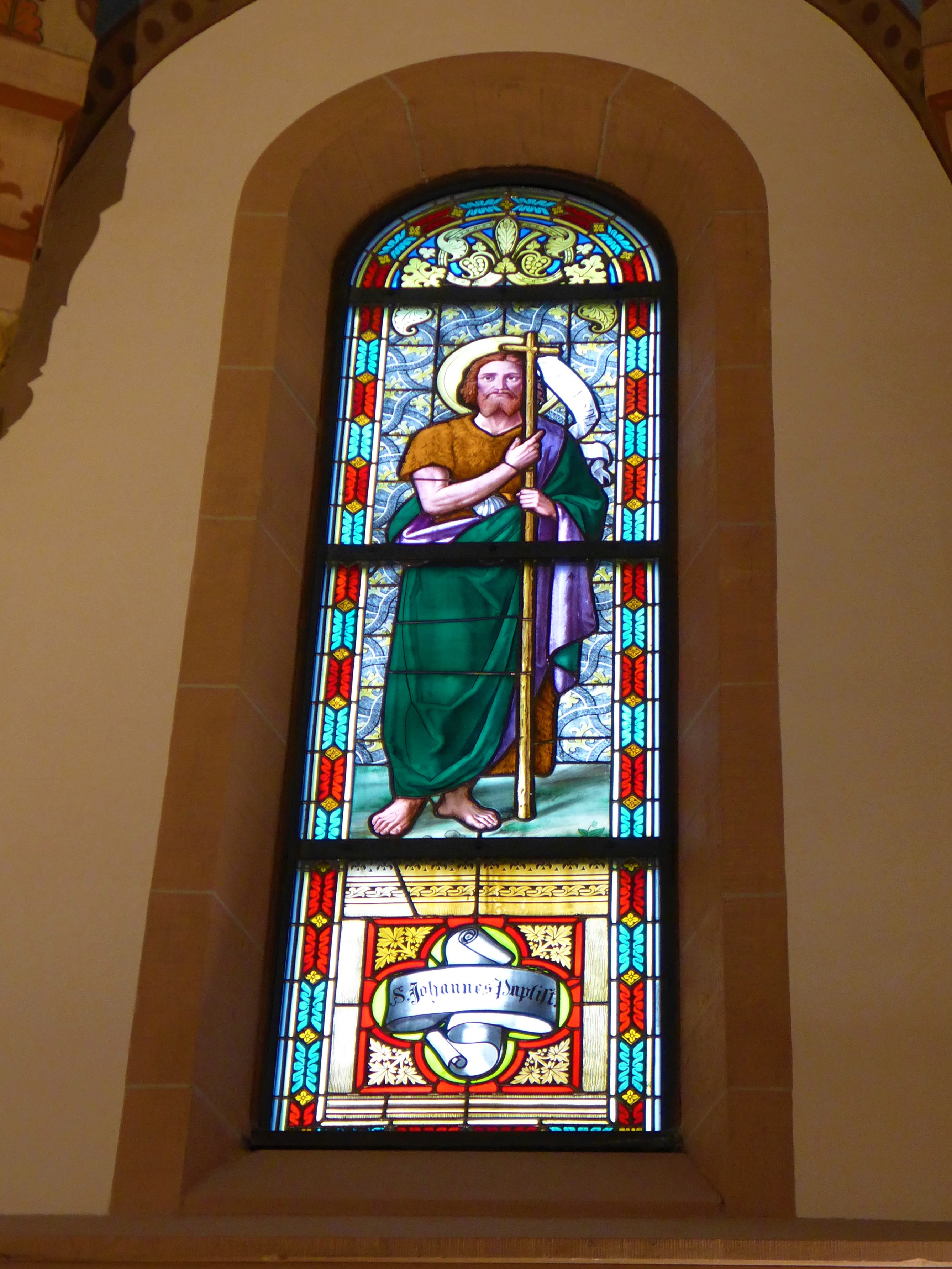 St. Venantius (Wertheim), Apsisfenster "Hl. Johannes der Täufer"